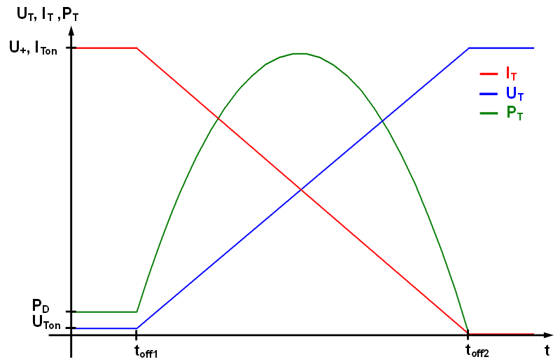 Diagramm: Schaltverluste bei ohmsche Last